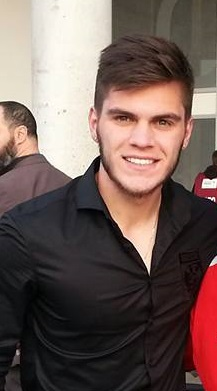 Nathan Allan de Souza